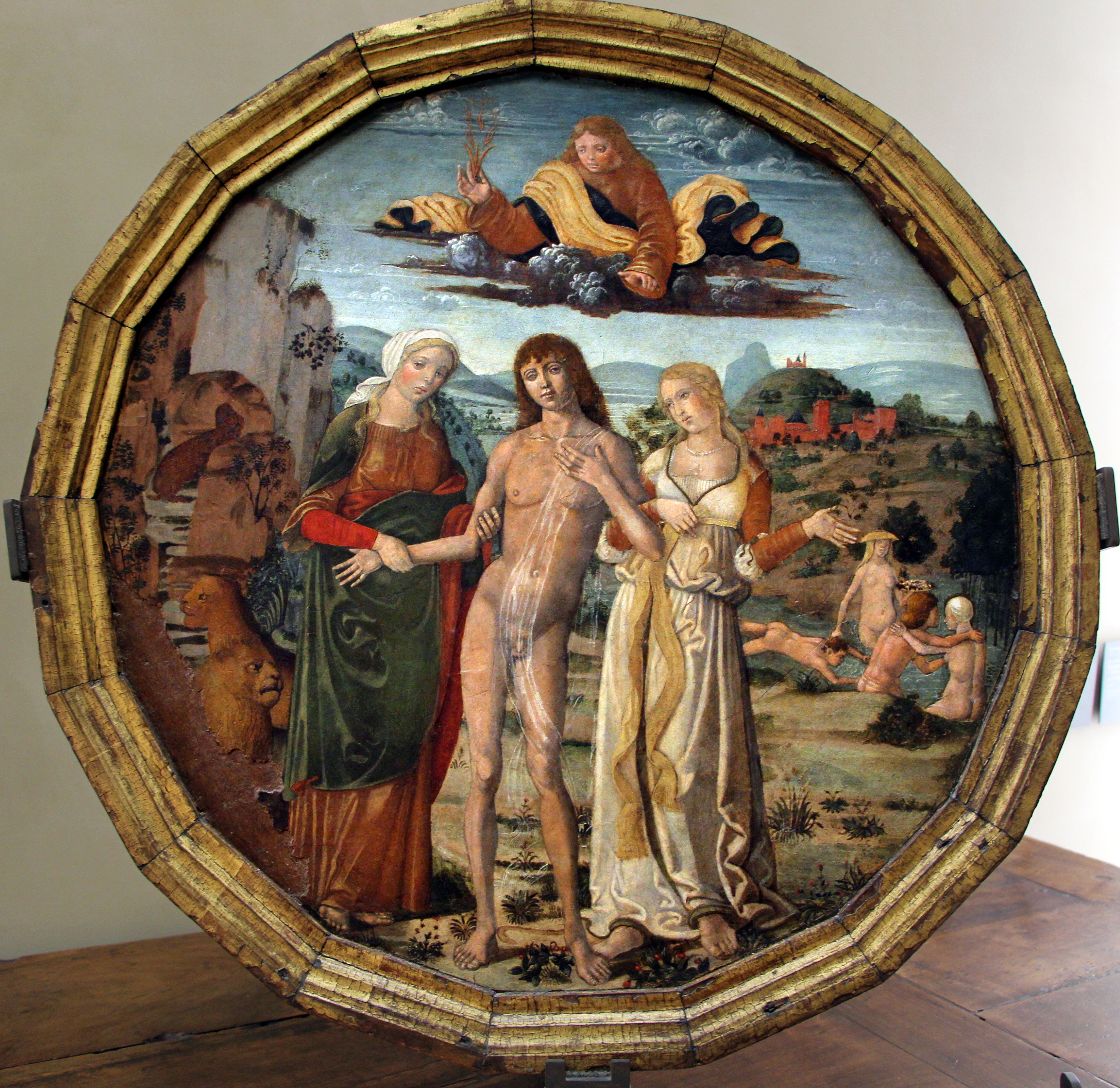 Galleria G. Franchetti alla Ca' d'Oro - MIBAC The making of this document was supported by Wikimedia CH. (Submit your project!) For all the files concerned, please see the category Supported by Wikimedia CH. This is a photo of a monument which is part of cultural heritage of Italy.